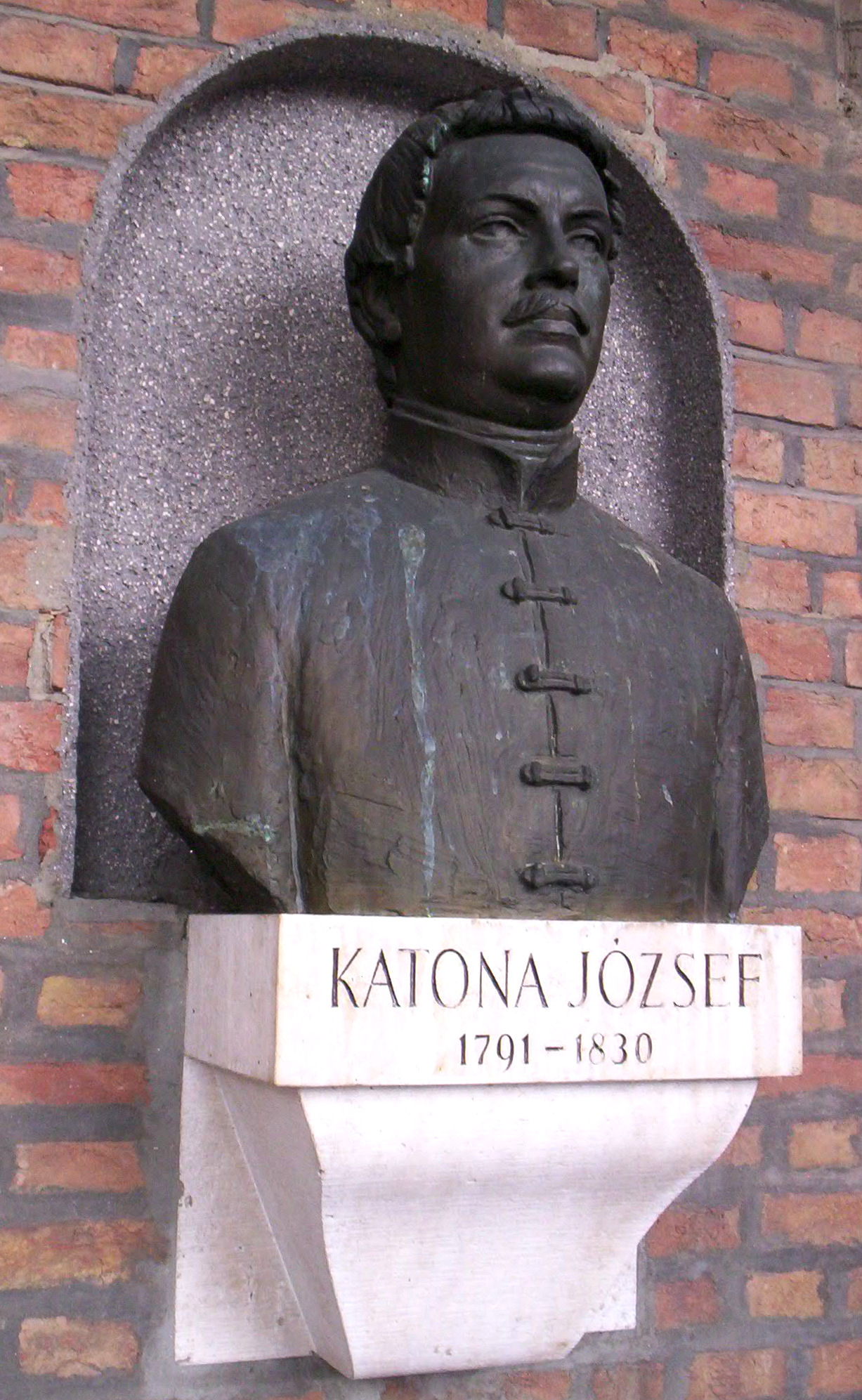 Katona József szobra a szegedi Pantheonban. Pátzay Pál (1896–1979) alkotása (1971) – photo taken by uploader User:Csanády in 2006.